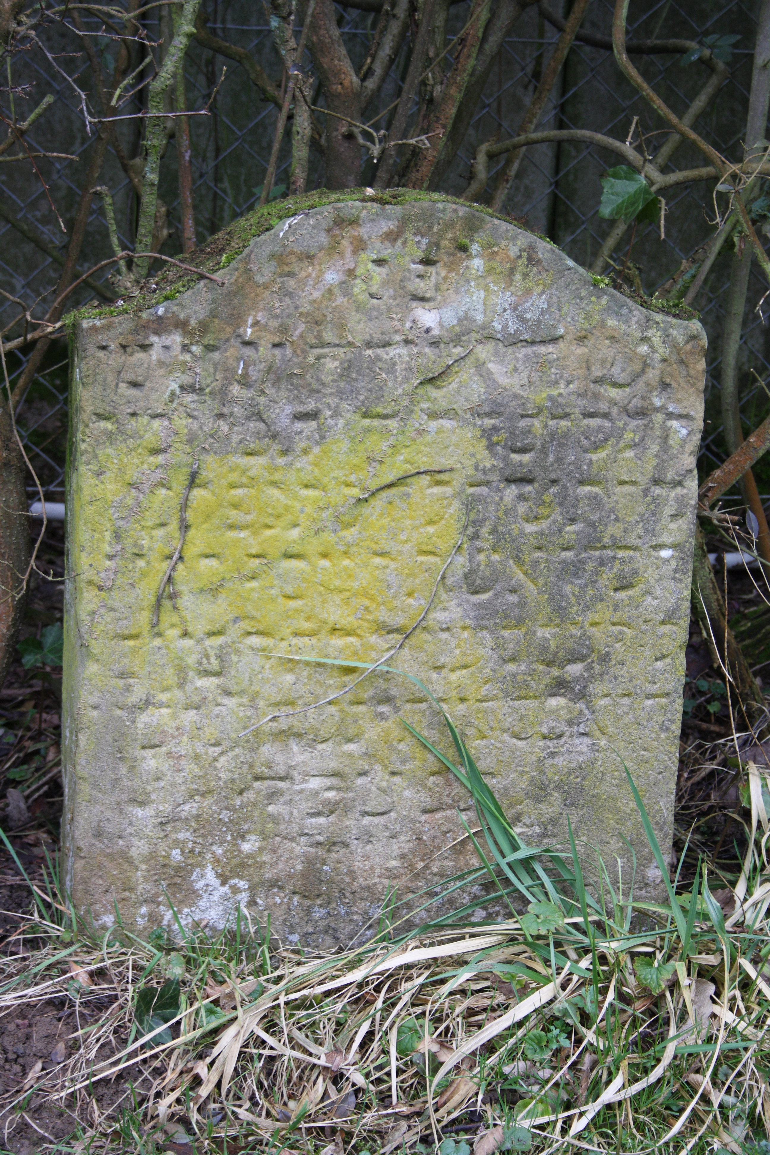 Jüdischer Friedhof in Endenich, einem Ortsteil von Bonn, Grabstein